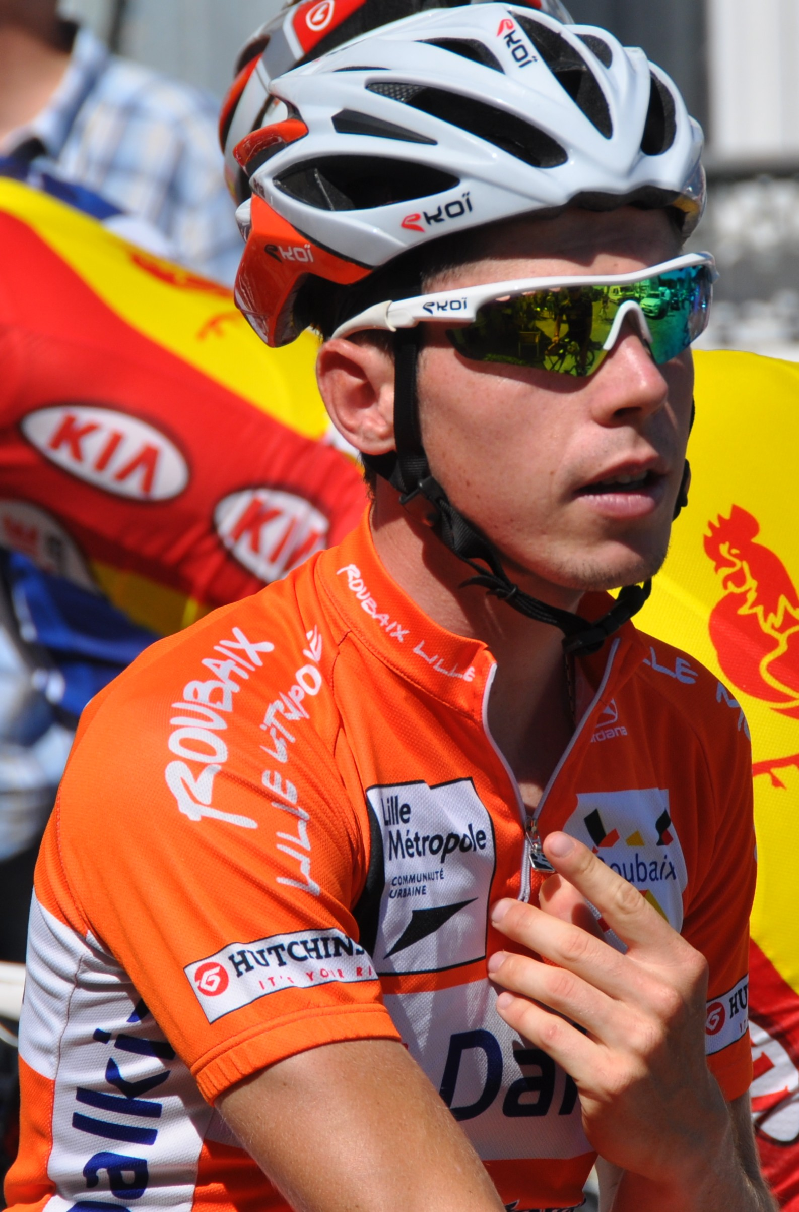 Au départ de la 2e étape de la Mi-août en Bretagne 2012